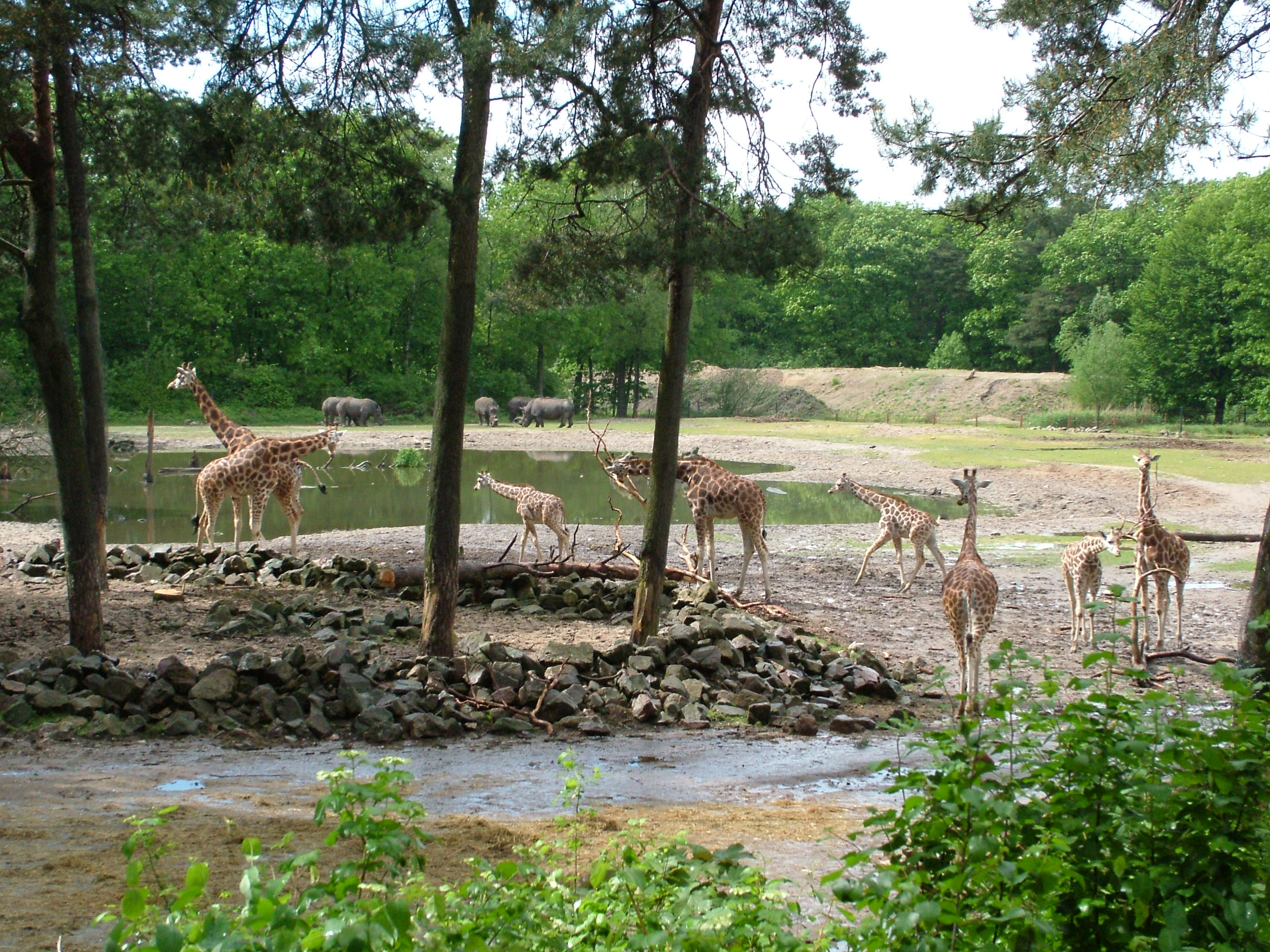 Burgers Zoo (Arnhem), Giraffen und Nashörner